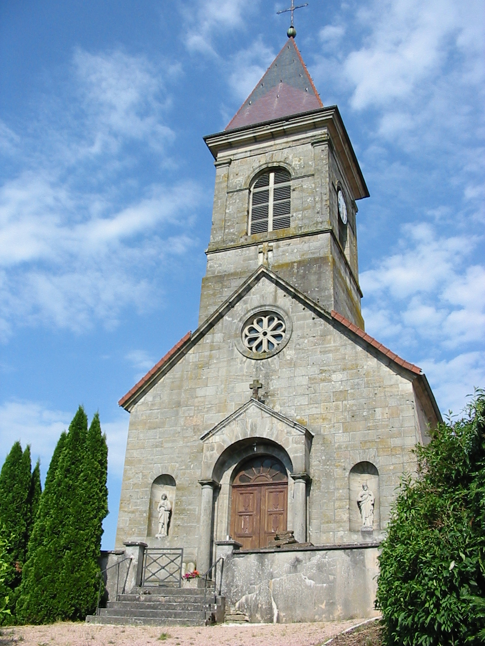 Fremifontaine, commune des Vosges. L'église paroissiale Saint-Pierre-ès-Liens.